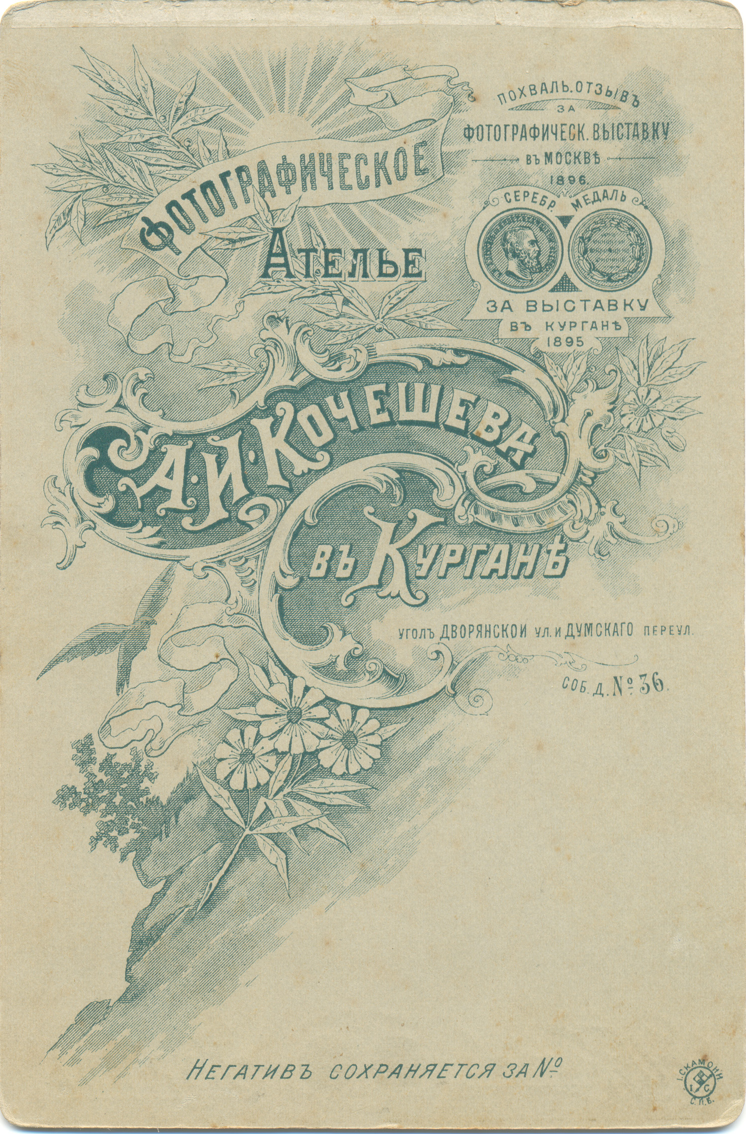 Фотографическое ателье Алексея Ивановича Кочешева